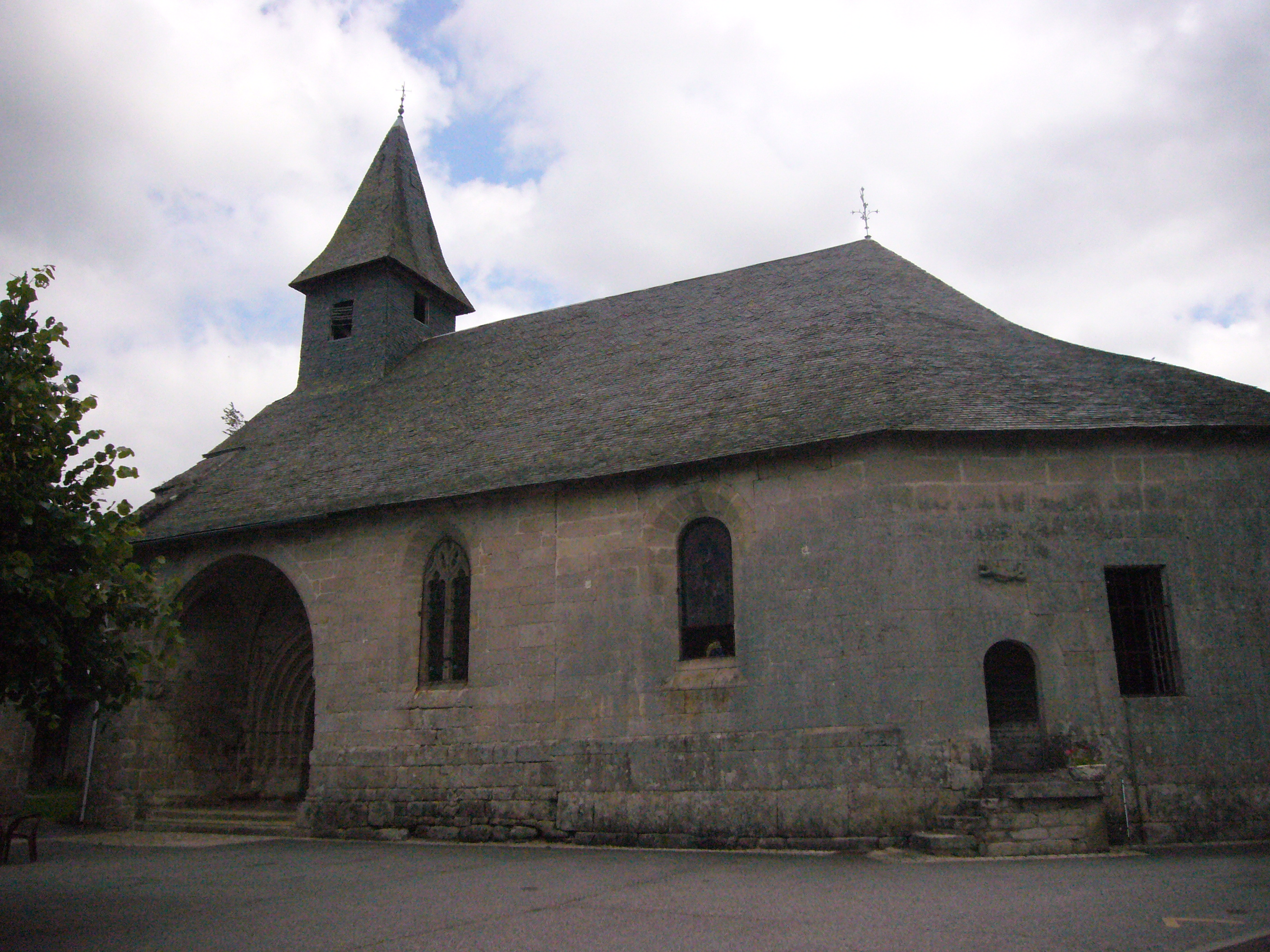 L'église de Chaumeil (Corrèze, France)